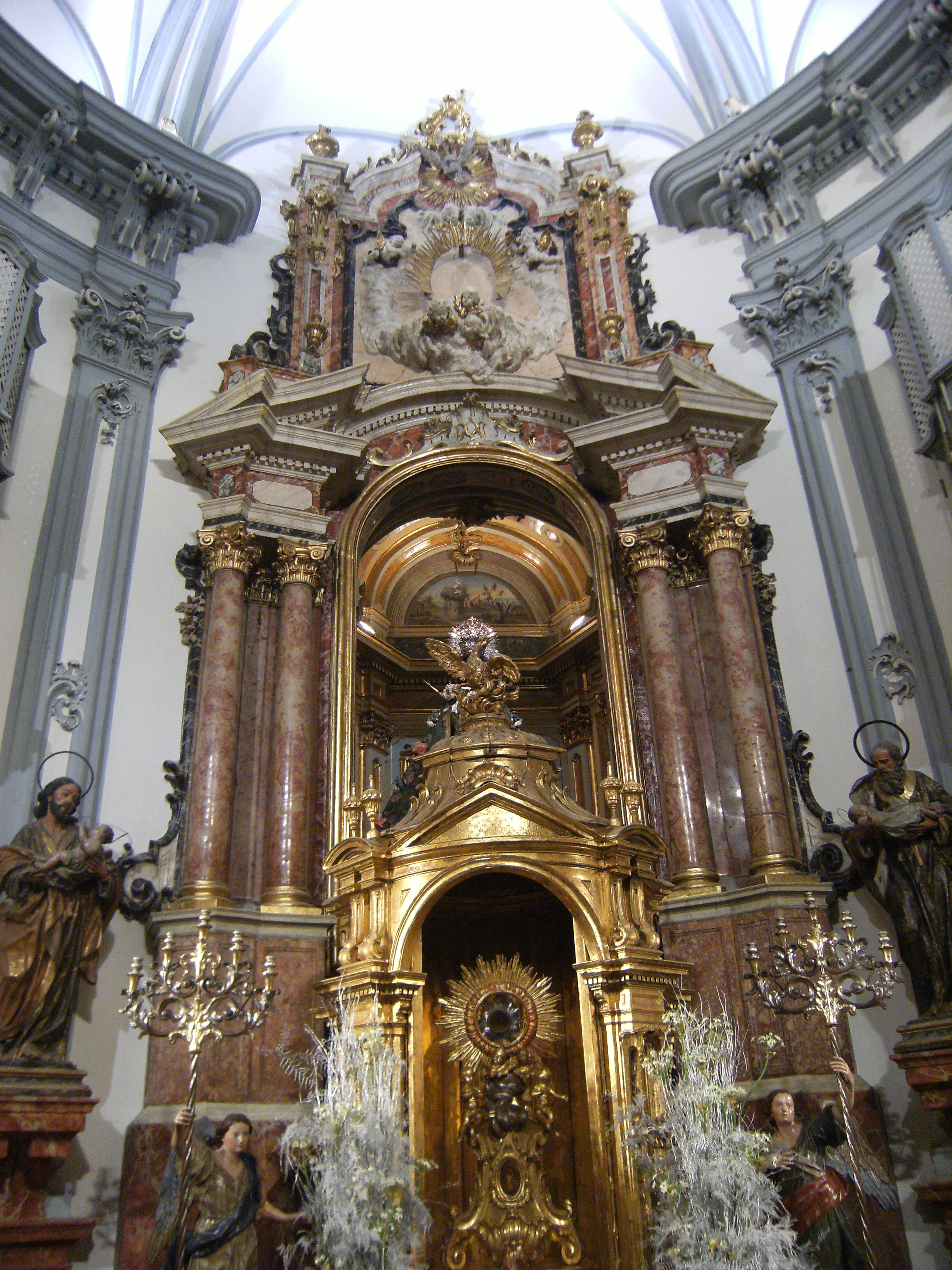 Retablo del Altar Mayor de la Iglesia de San Juan de Dios de Murcia, España. Siglo XVIII